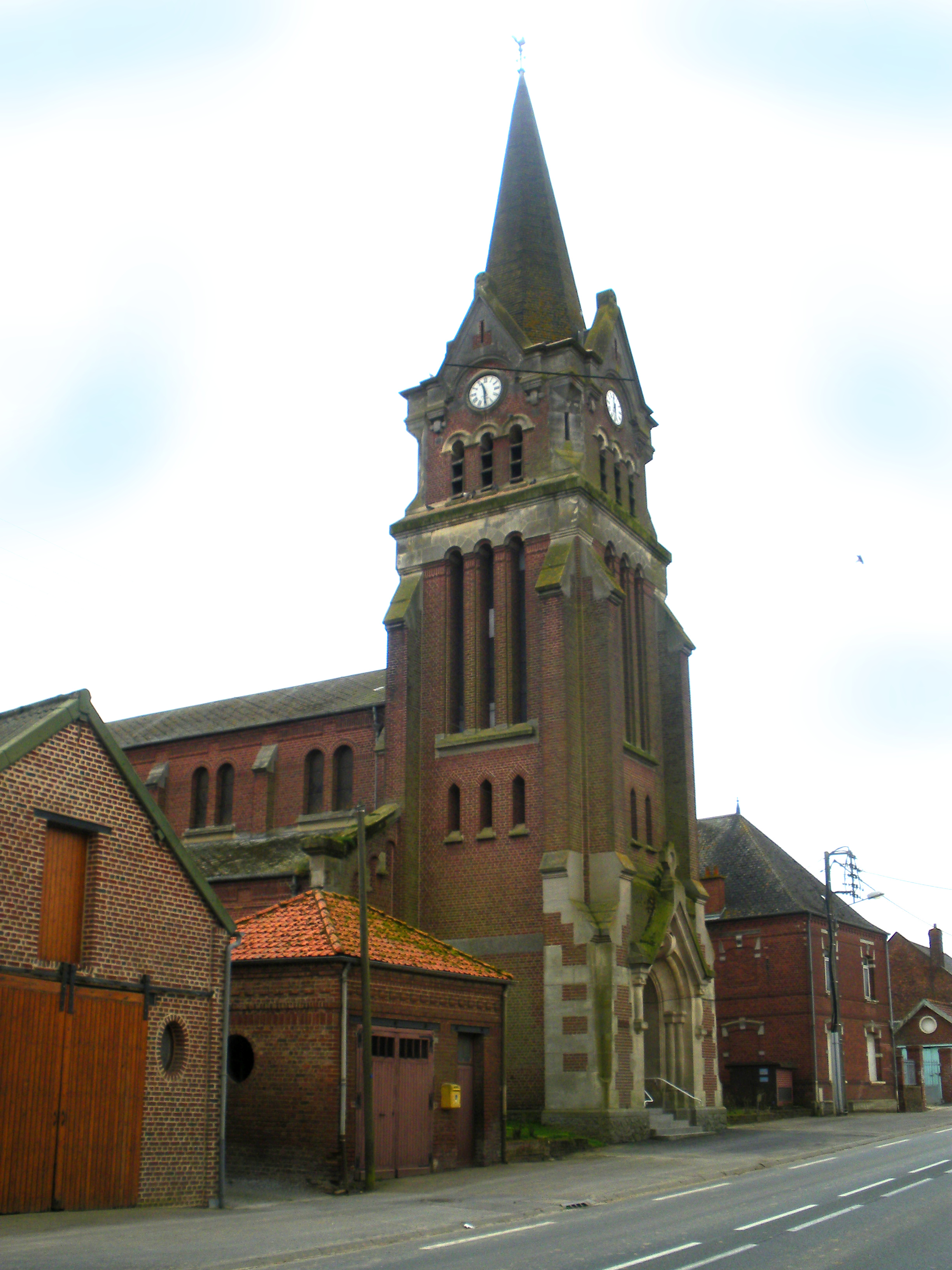 Vue de l'église Saint-Ouen de Boursies.